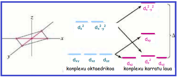 Koordinazio konposatu tetraedrikoen kristal eremuen banaketa